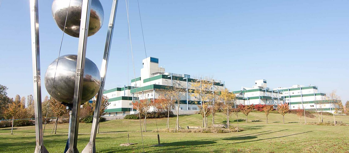 Polo di Ingegneria, nato da un progetto dell’architetto Giancarlo De Carlo. Il nome "Nave", che tutti utilizzano per identificare questa sede universitaria, si deve proprio all'architettura degli edifici che, con piani asimmetrici, sostegni esterni evidenti e oblò sulle porte, ricordano la struttura tipica di una nave di importanti dimensioni.